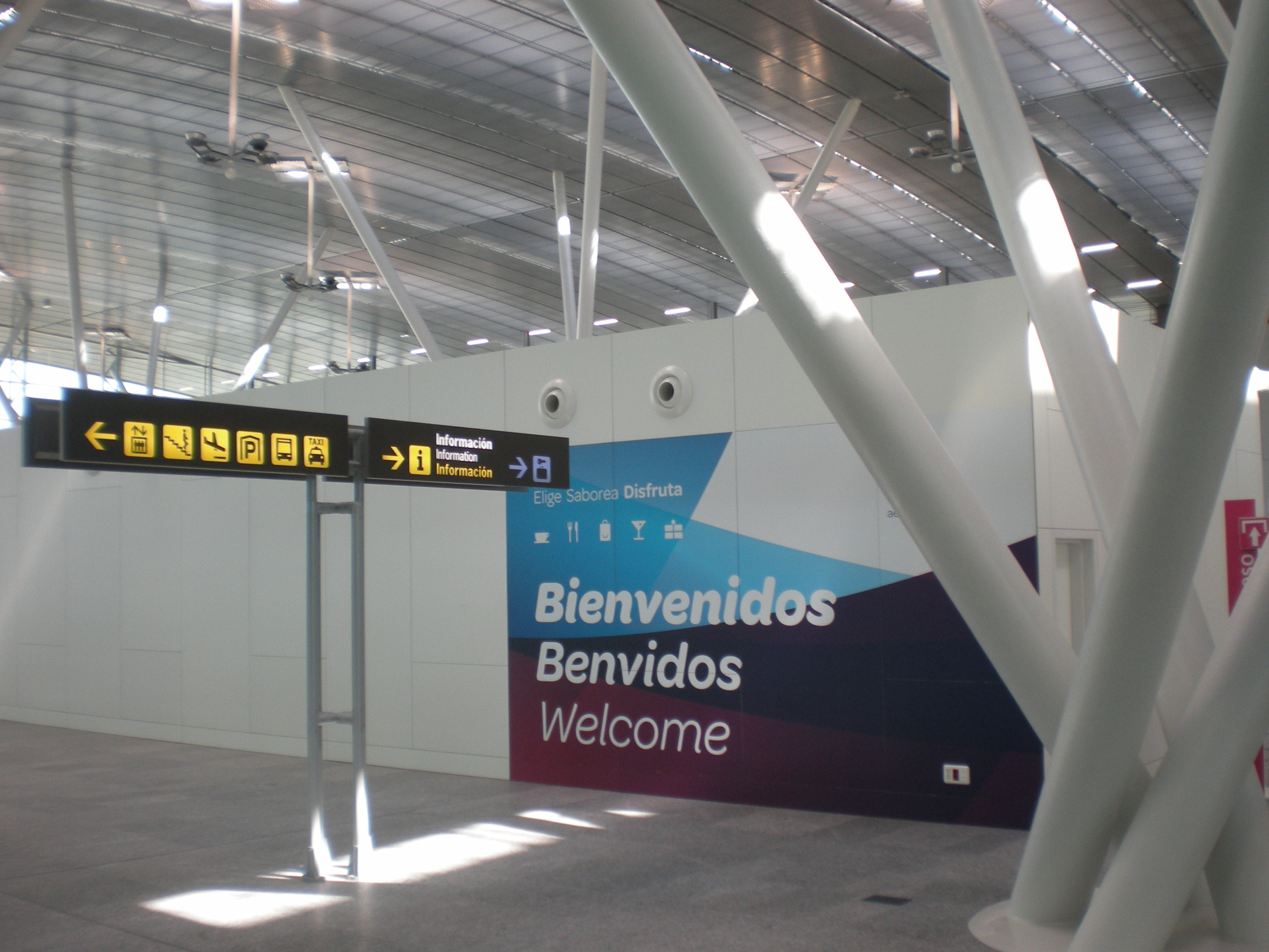 Interior de la terminal de pasajeros del aeropuerto de Santiago de Compostela